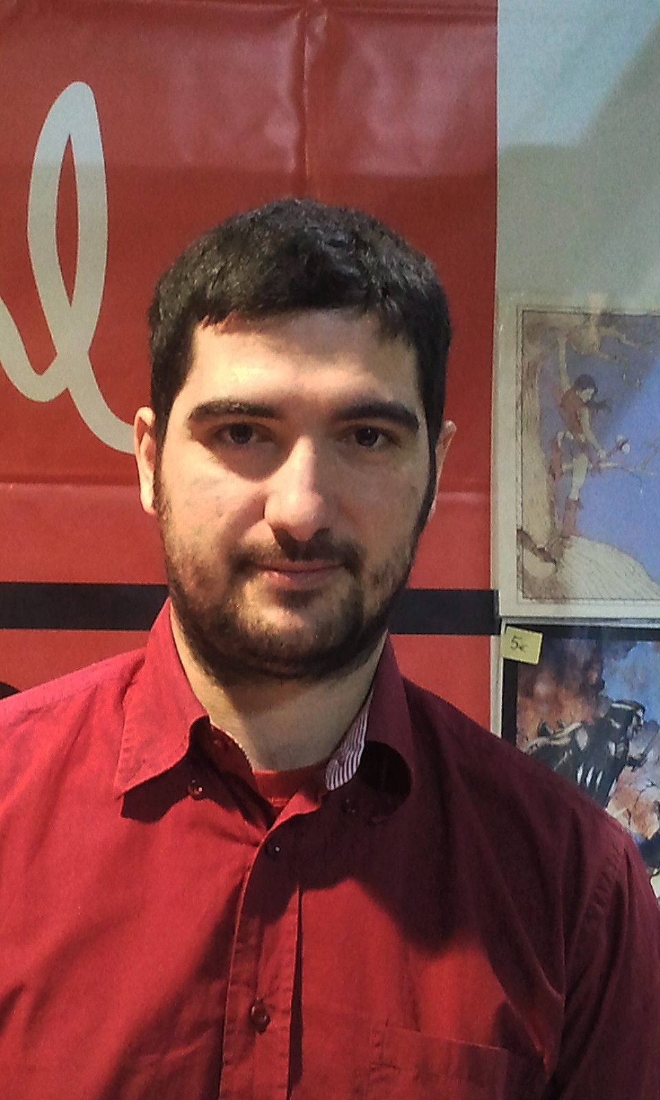 Cartoomics - Fieramilano a Rho (MI)